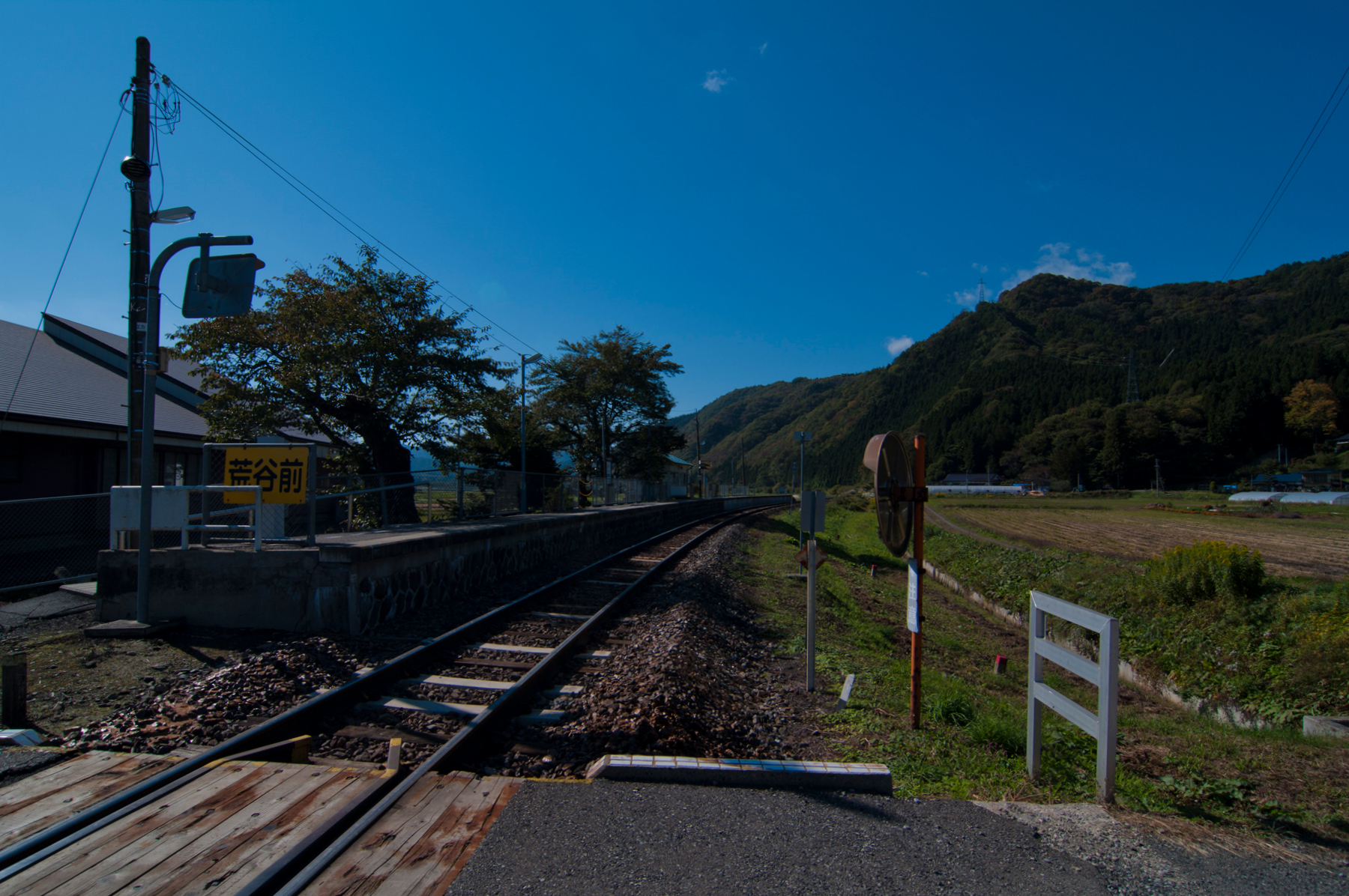 東日本旅客鉄道釜石線荒谷前駅